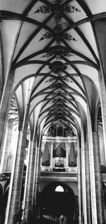 Freiberg, Dom, Orgel ADN-ZB Thieme 19.9.83 Bez. Karl-Marx-Stadt: 5. Gottfried-Silbermann-Tage. Nach Abschluß umfangreicher Restaurierungsarbeiten erklingt während dieser traditionellen Musikveranstaltung vom 14. - 24.9.83 wieder die erhabene Klangfülle der 1714 geschaffenen Orgel im Freiberger Dom. Die Silbermannorgel ist mit 45 Registern und 2.674 Pfeifen das größte erhaltene Instrument des Meisters im Bezirk.